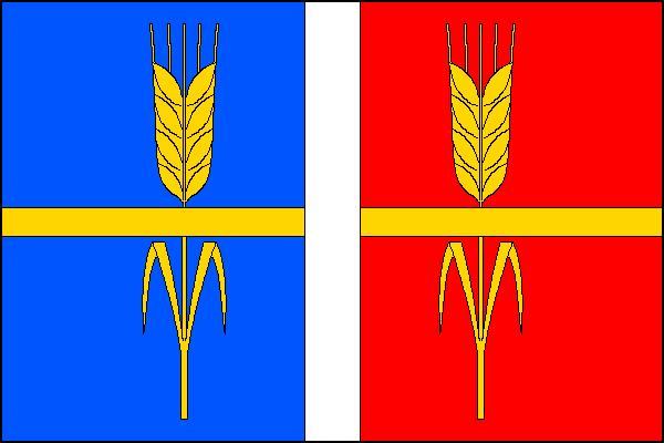 Vlajka obce Lány (okres Chrudim)